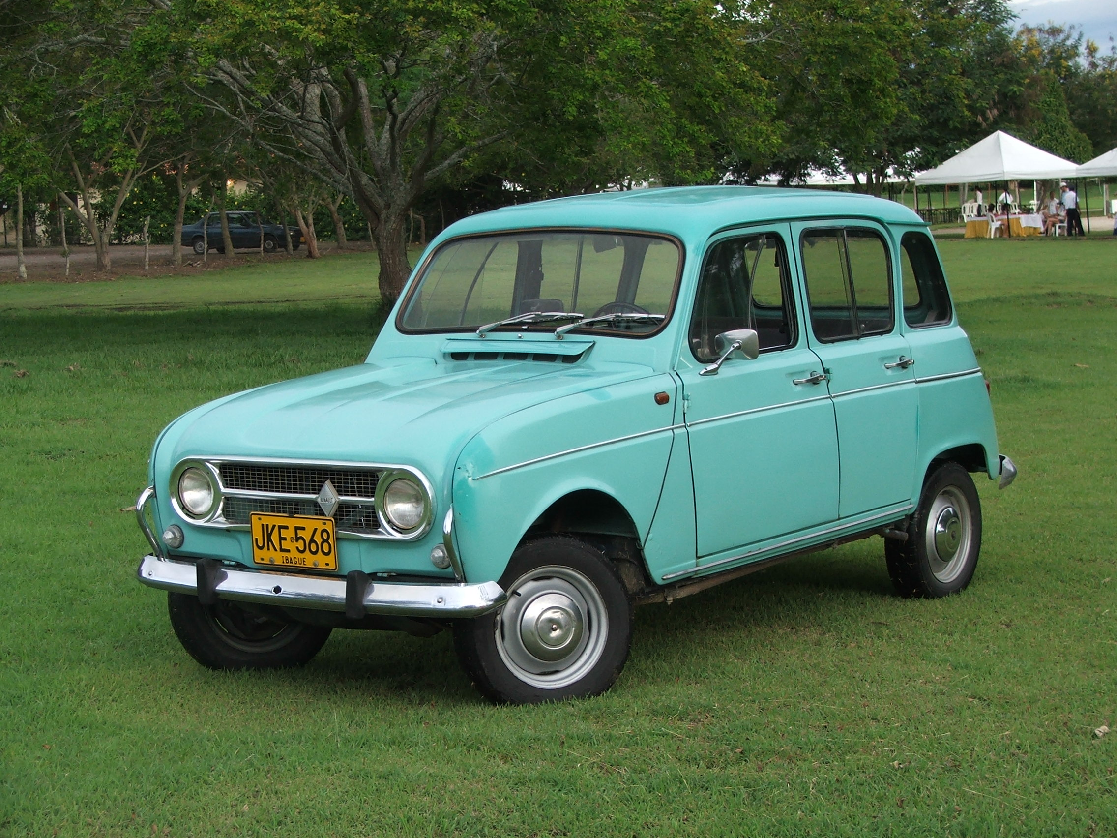 Mi R4 R-1123 año 1970